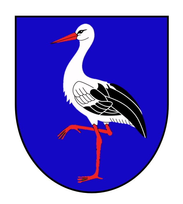 Schild derer von Schilwazhausen